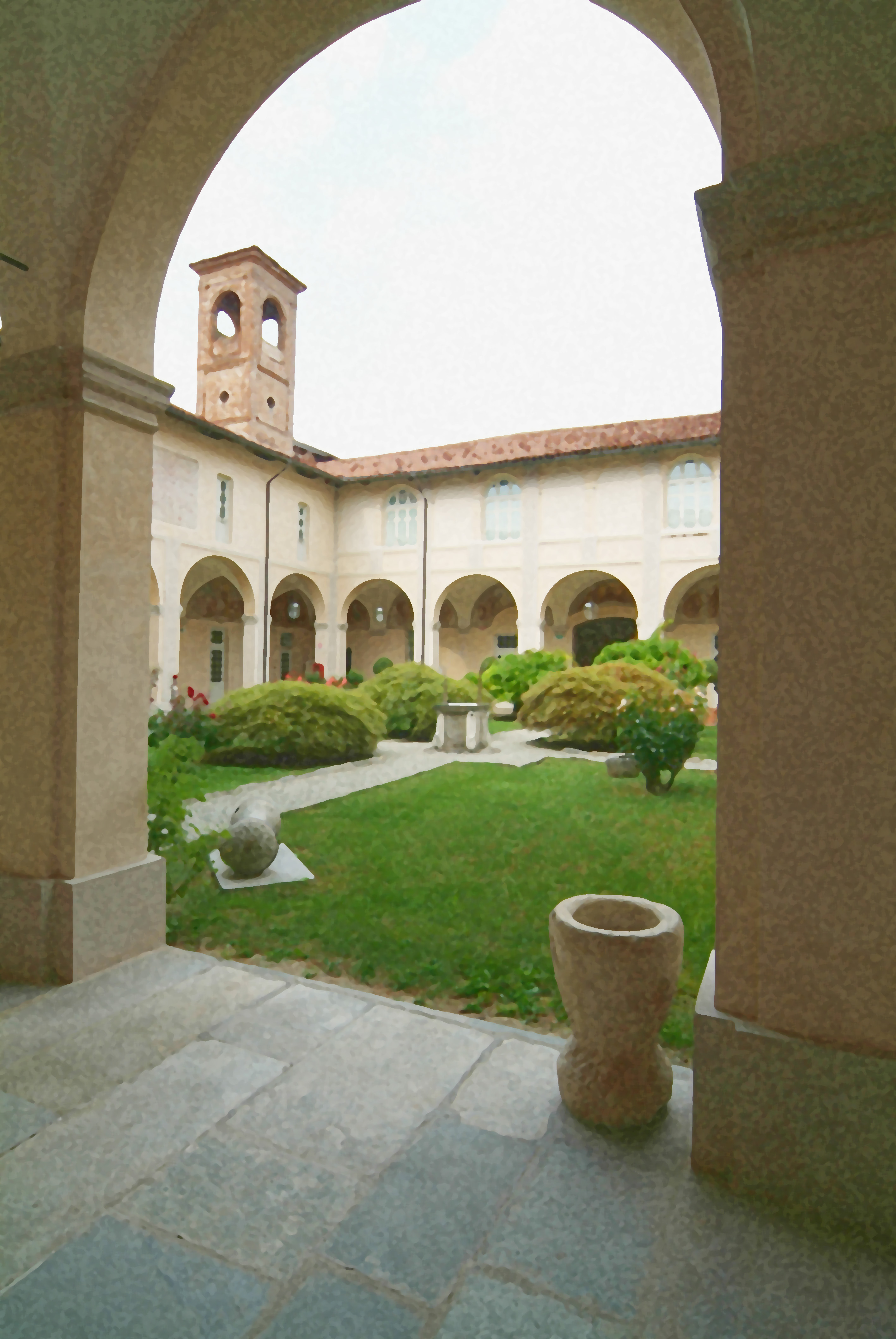 Chiostro interno all'ex convento francescano